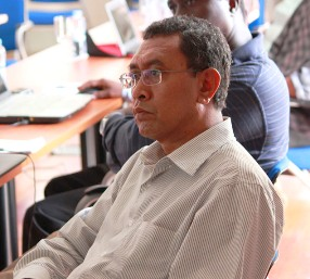 Tetun: dokumentasaun